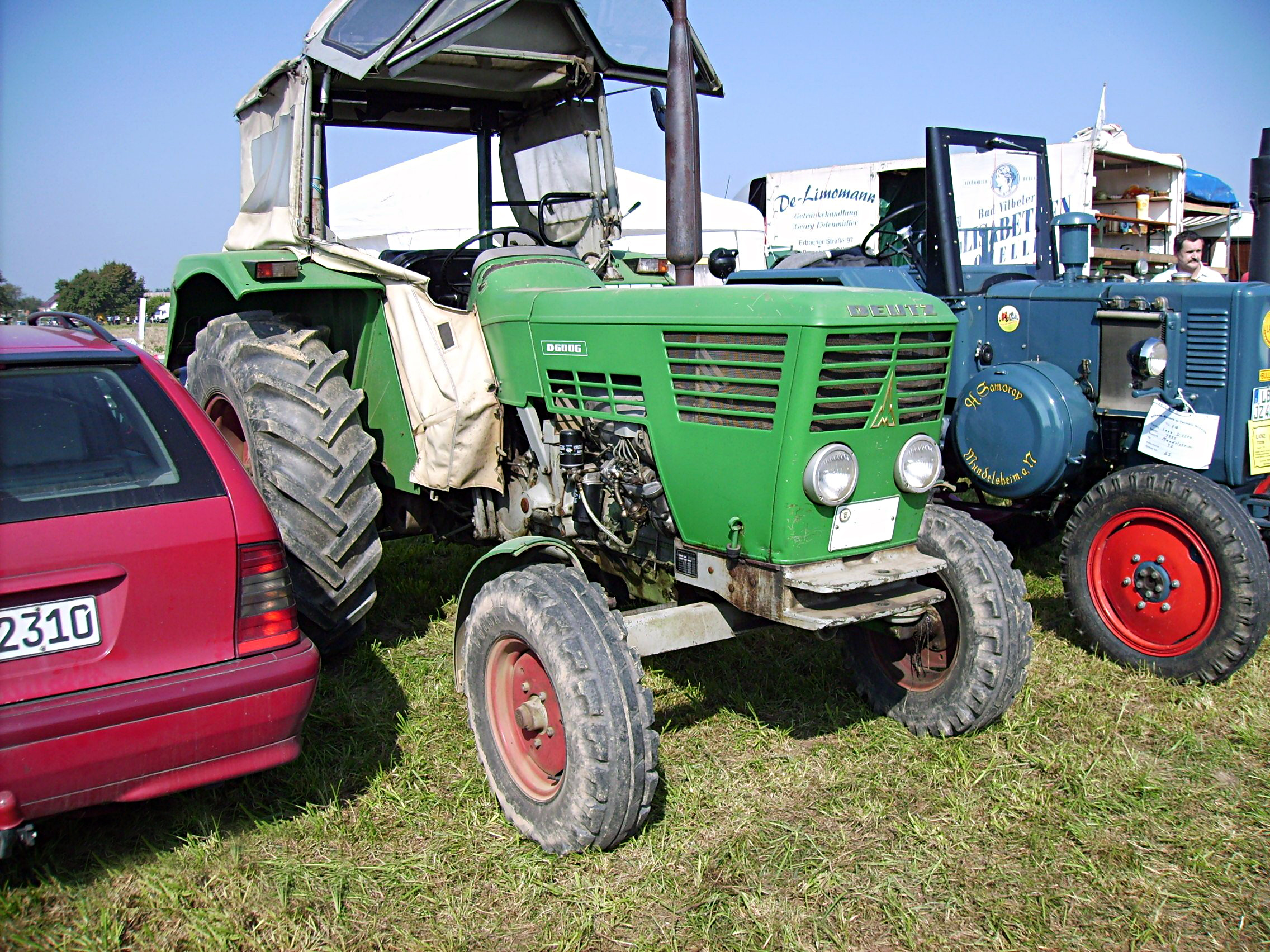 Deutz D6006